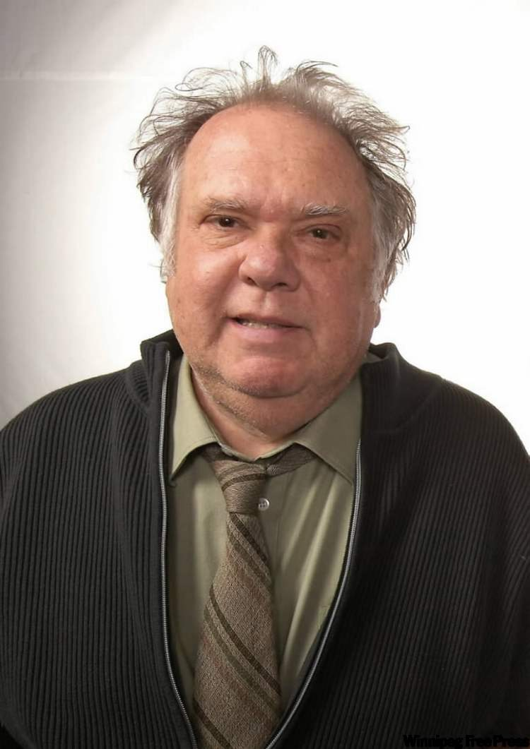 Maury Alan Chaykin